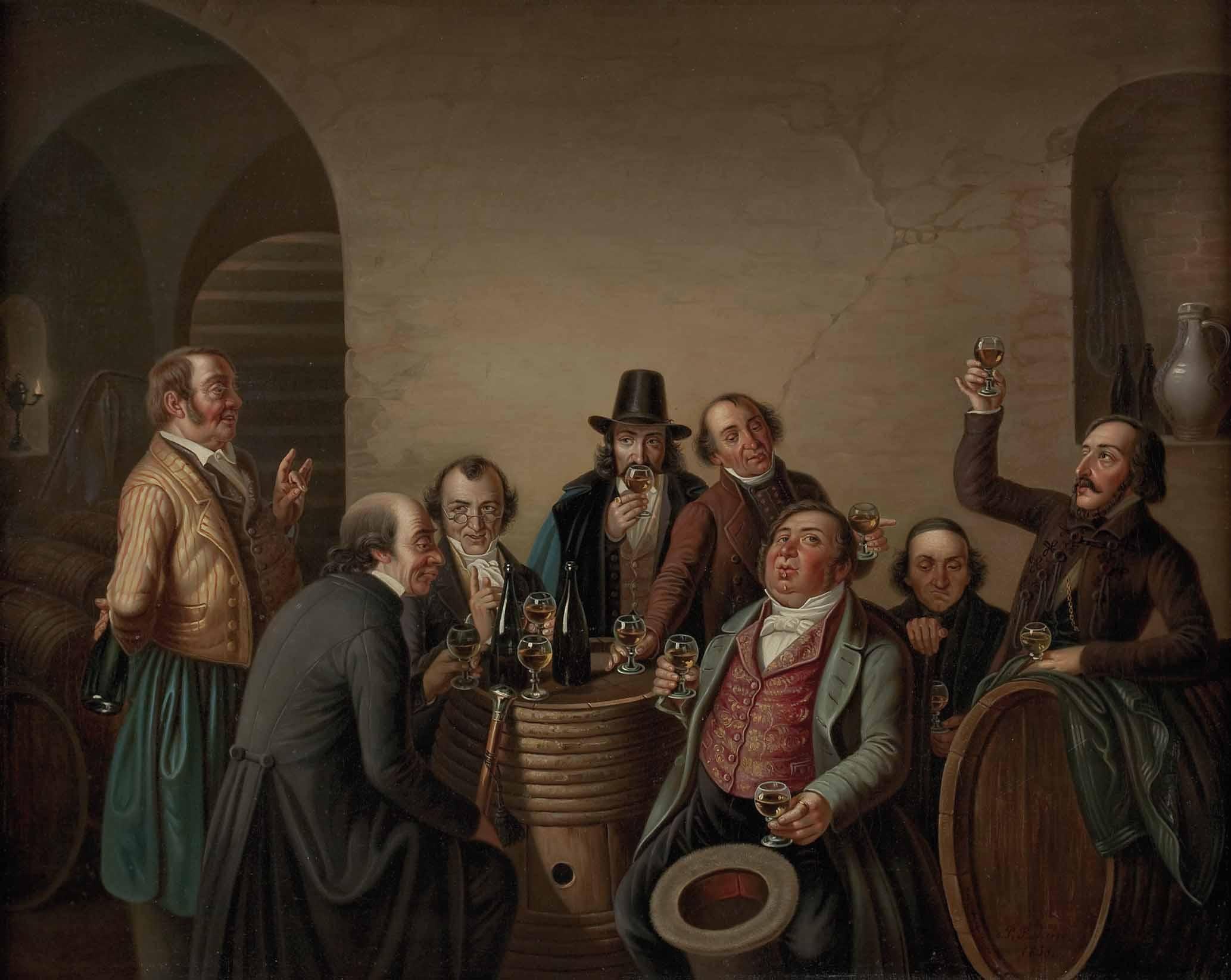 "Die Weinverkostung" unten rechts signiert: P. Bohun, datiert: 1838, Öl auf Leinwand, ca. 56 x 70 cm